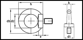 DIN 580